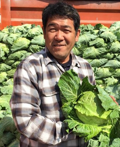 岡本重明 (2015.03.17)